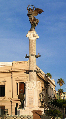 Reggio Calabria, Monumento ai caduti, Vittoria alata. Opera di Francesco Jerace. Lungomare Falcomatà.